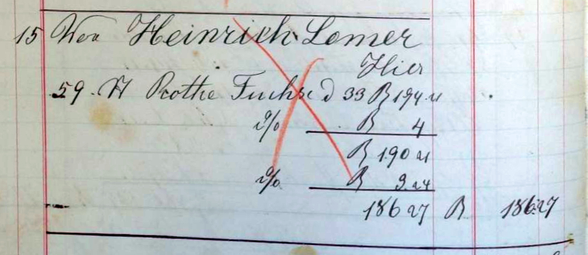 Kauf Buch von Naoum Dedo, Rauchwarenhändler in Leipzig, 1872-1875.